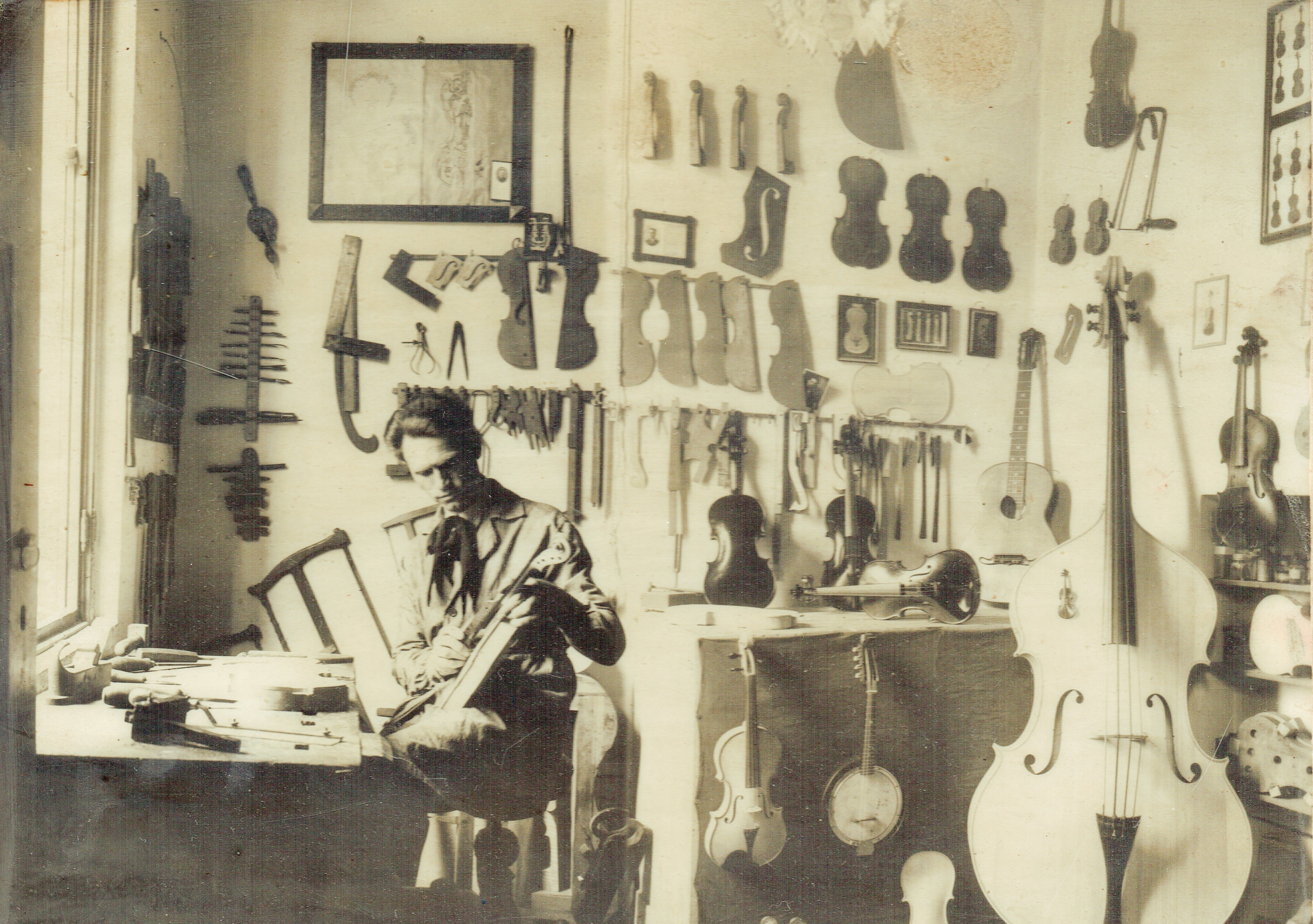 il liutaio Luigi Galimberti nel suo laboratorio di Via Dolomiti 17 a Milano